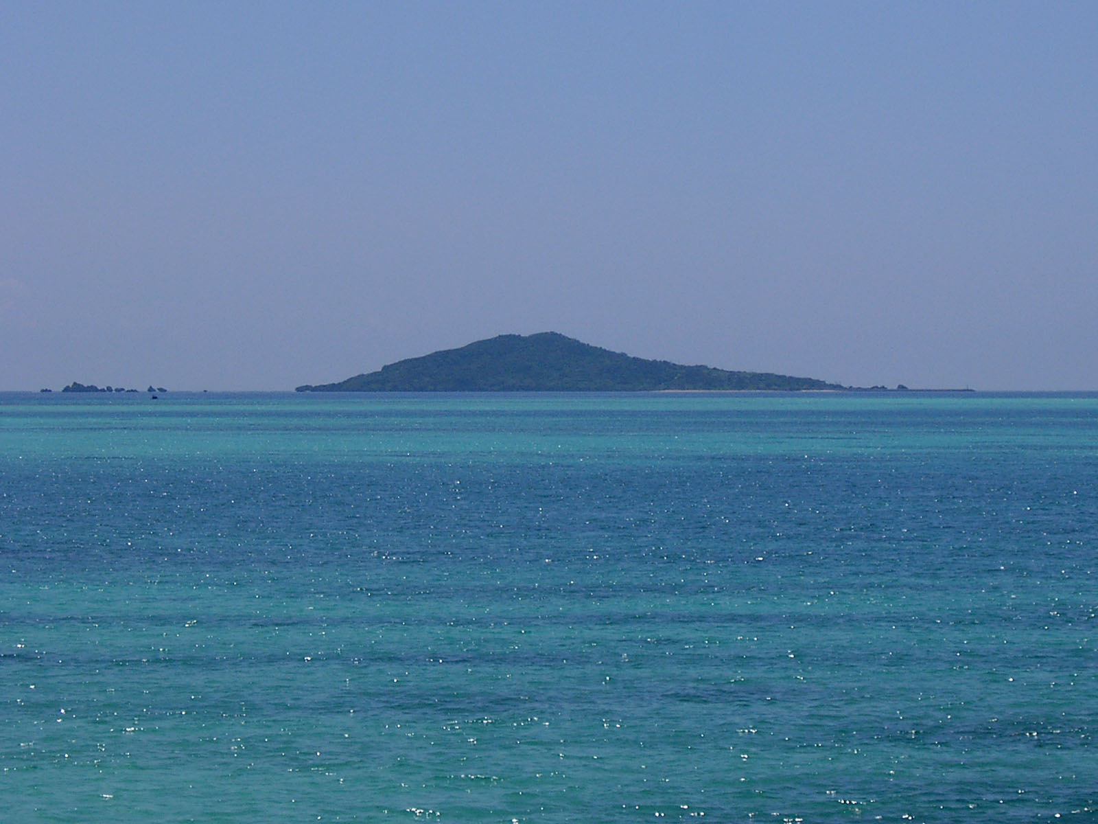 Oogami Island, Japan / 大神島（宮古諸島）